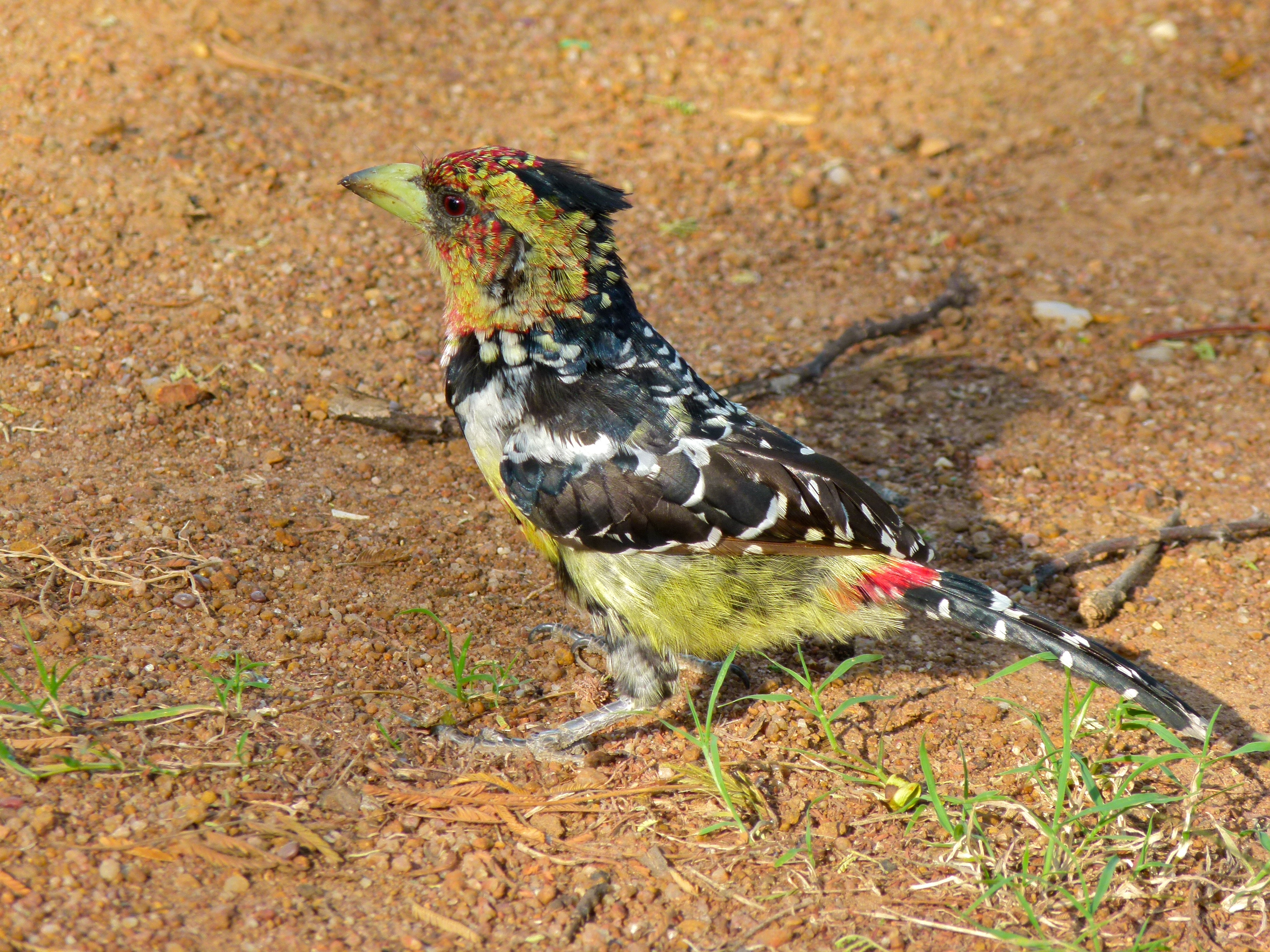 Manyane Resort, Pilanesberg, SOUTH AFRICA